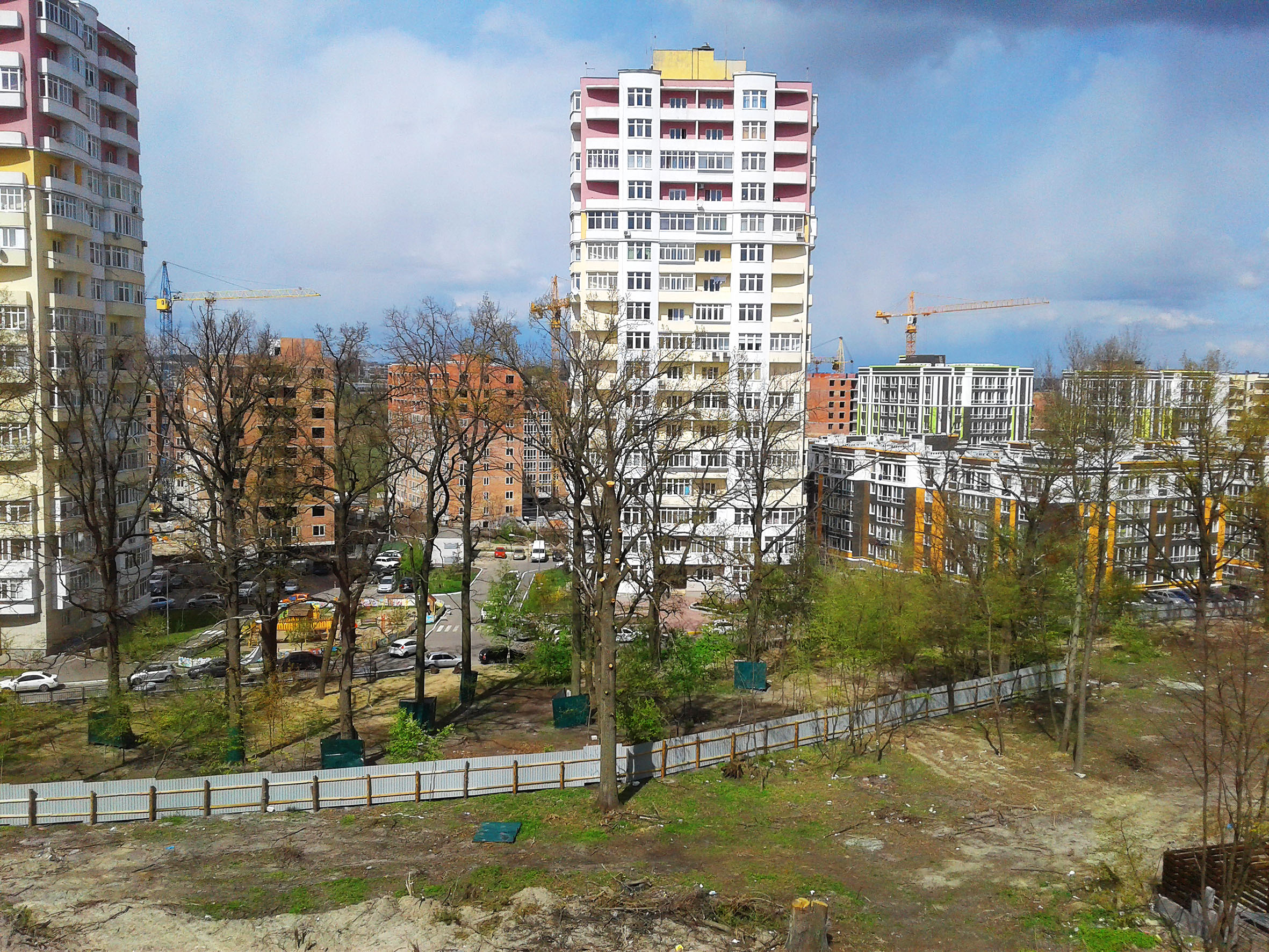 Вирублені дерева у Чорному лісі. Урочище Пилипів Потік. Ірпінь.